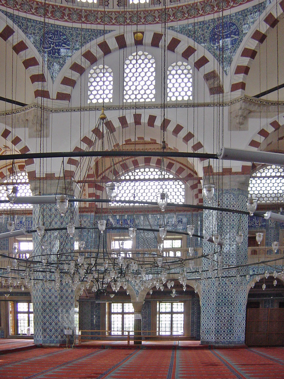 L'interno, interamente decorato in piastrelle in maiolica, per cui è celebre la piccola ma splendida moschea detta "Rüstem Pasha camii", ad Istanbul. Foto di: Giovanni Dall'Orto, 26-5-2006.